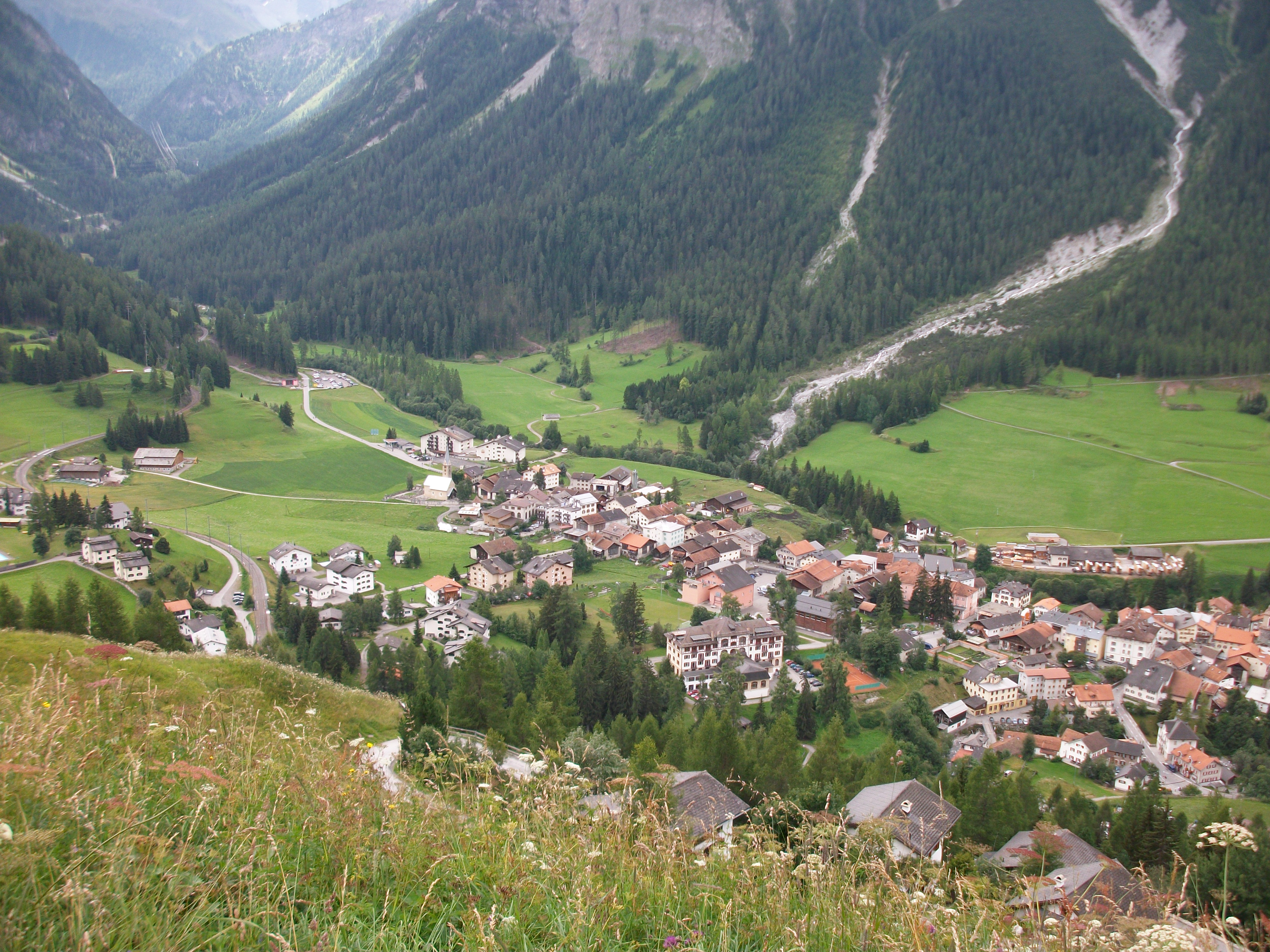 Luftbild von Bergün (süd-östlicher Teil)